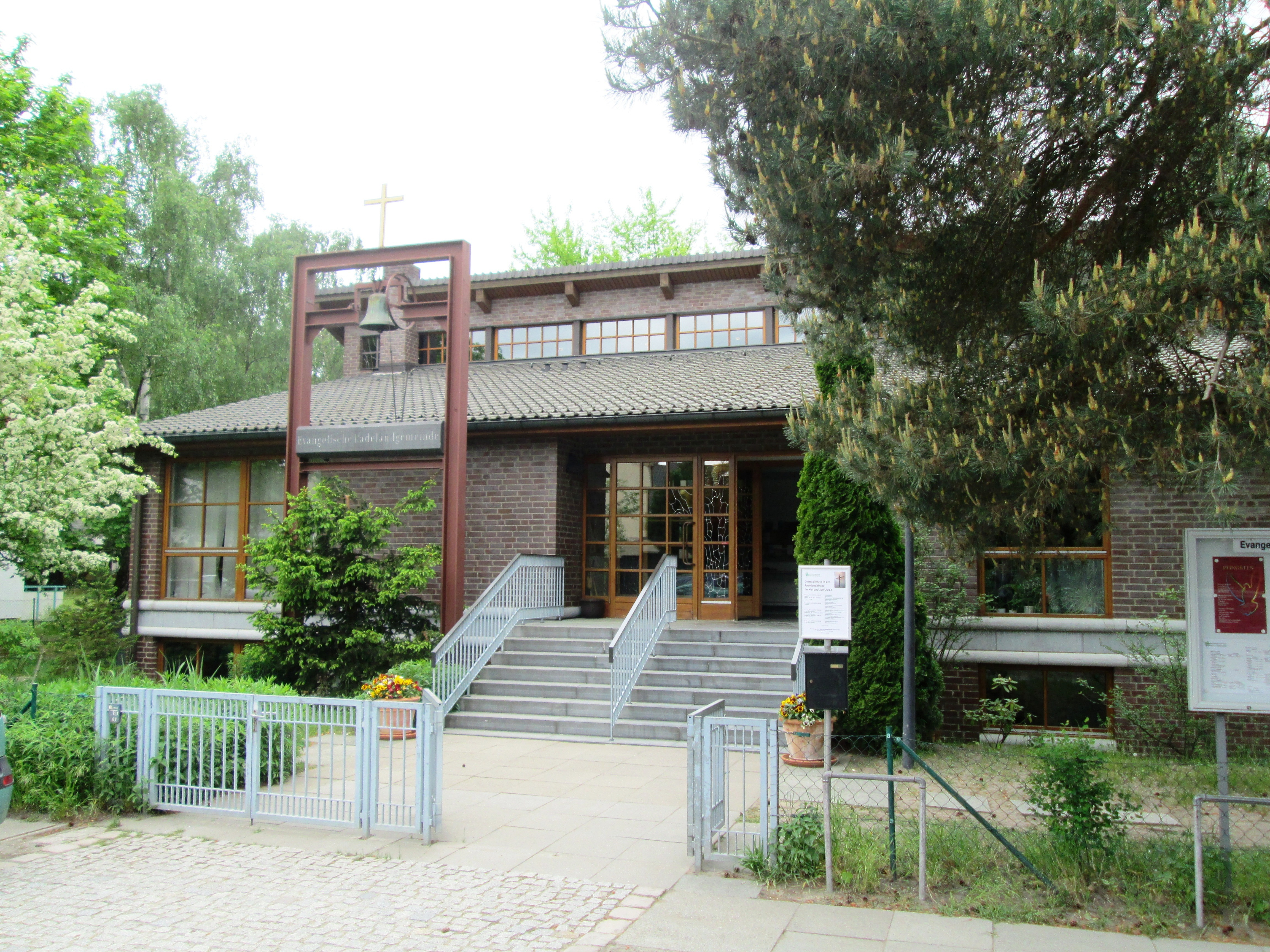 Evangelische Radeland-Kirche, Berlin-Hakenfelde